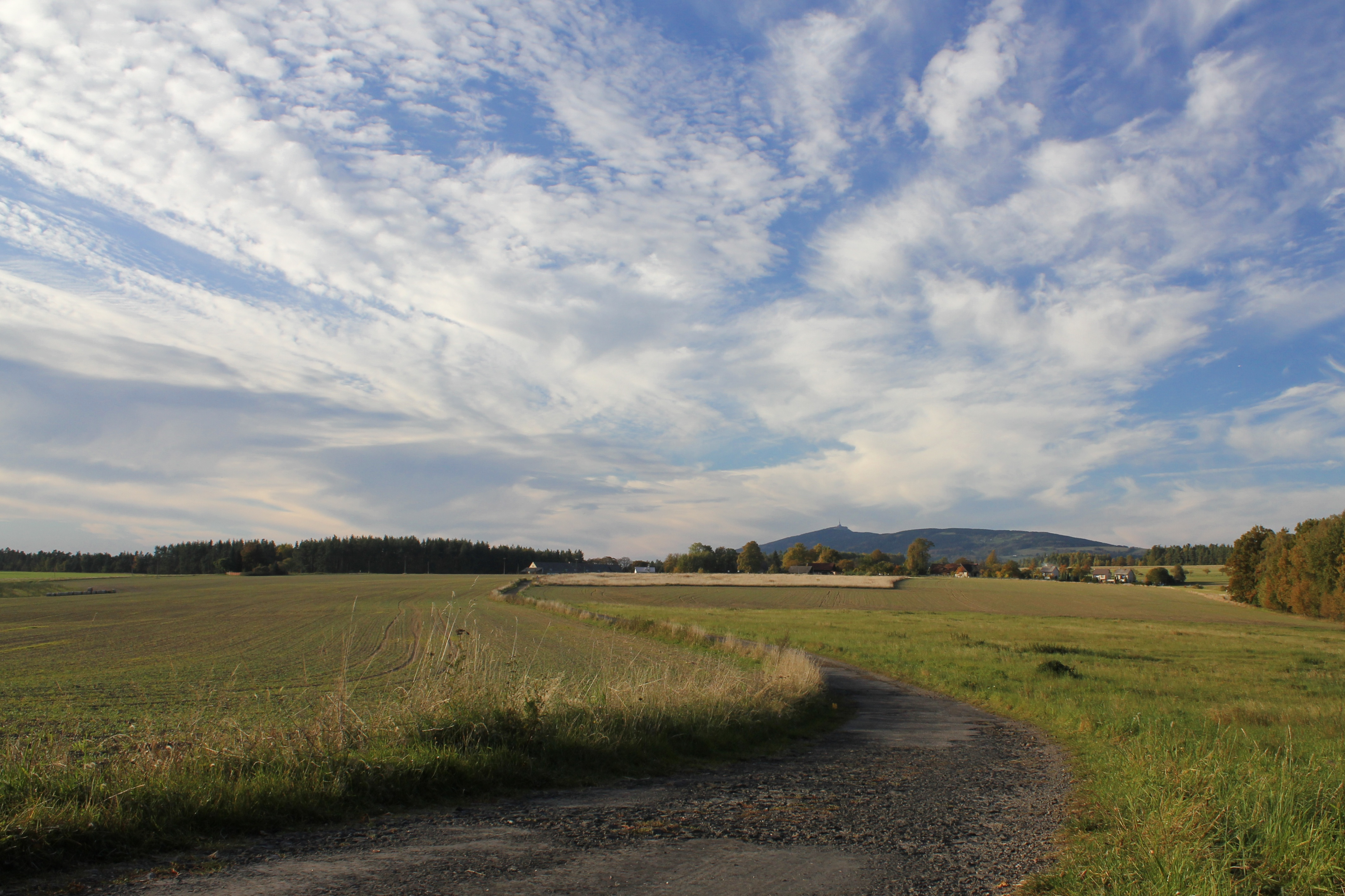 Vrchovina, Sychrov